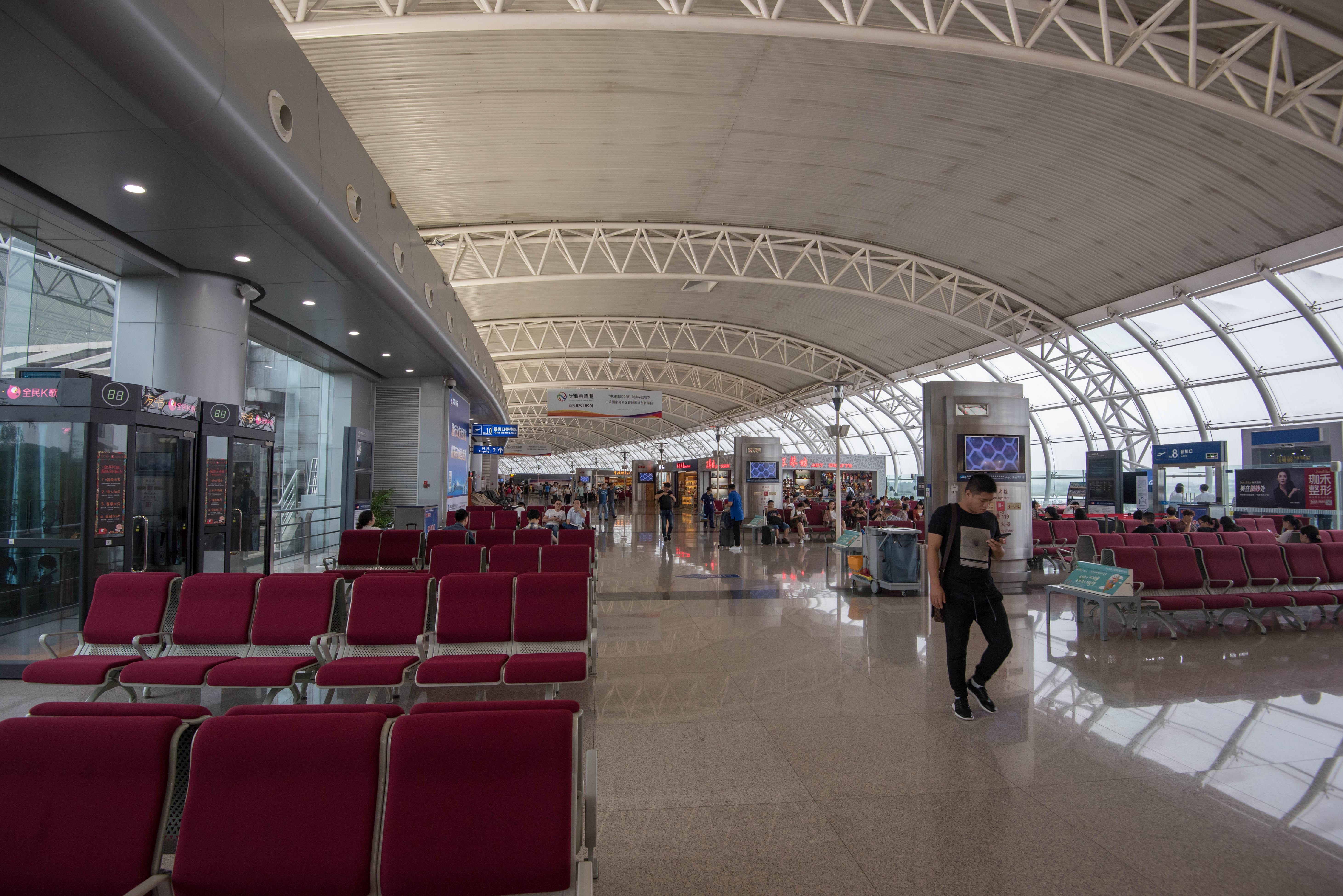 宁波栎社国际机场1号航站楼国内出发区域